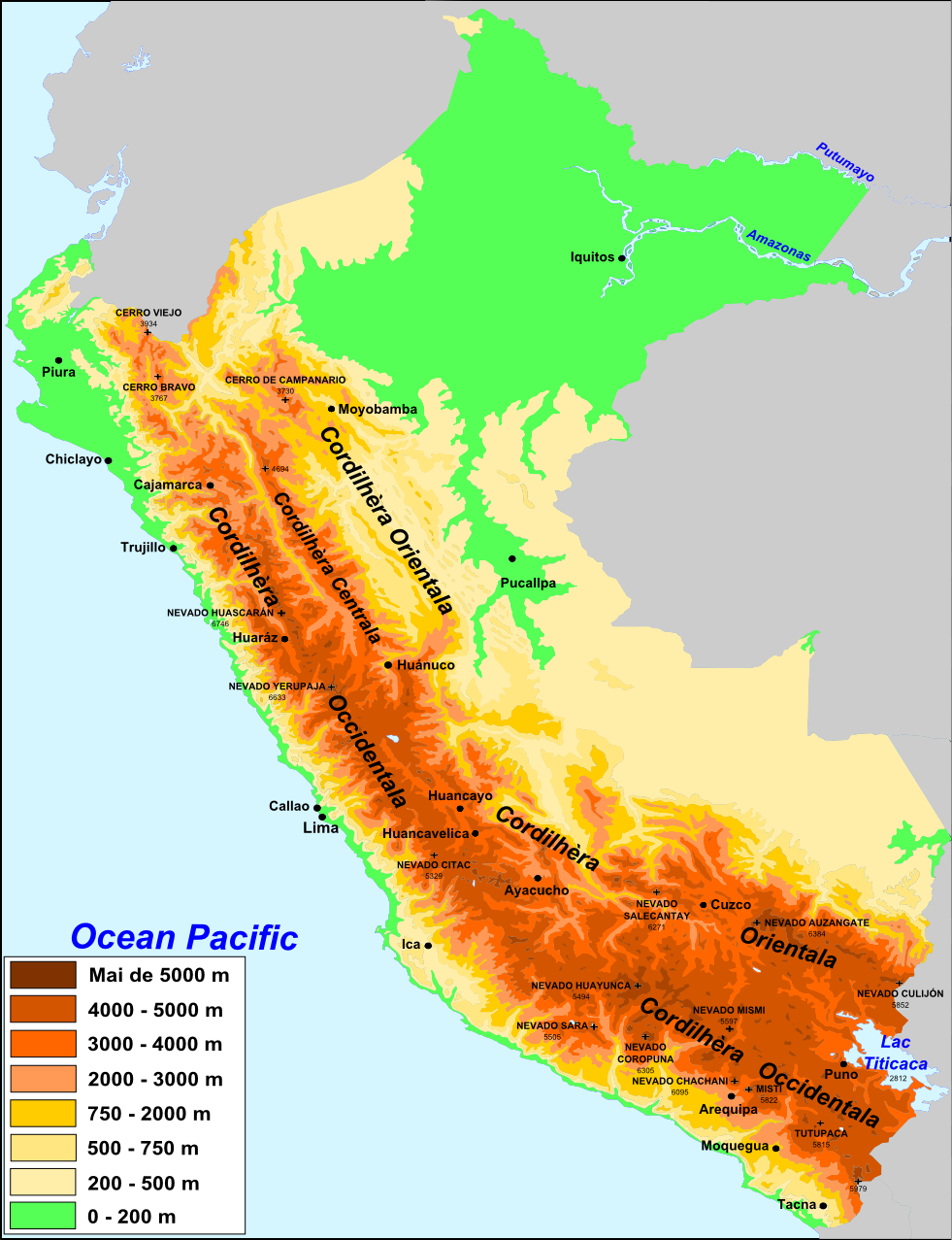 Topografia de Peró.